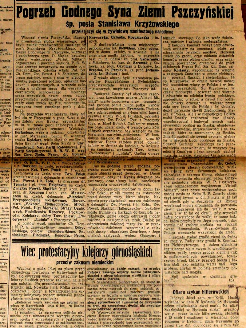 Opis pogrzebu śp. Stanisława Krzyżowskiego